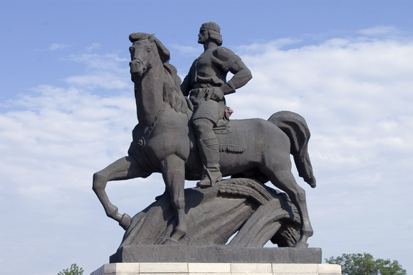 Паметник на деспот Добротица в град Добрич